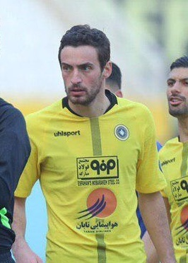 بازی دو تیم سپاهان و استقلال در ۹ آذر ۱۳۹۸ در ورزشگاه نقش جهان اصفهان که سپاهان توانست با گل ثانیه‌های پایانی نورافکن استقلال را با نتیجه ۲-۲ متوقف کند. (گزارش کامل بازی)